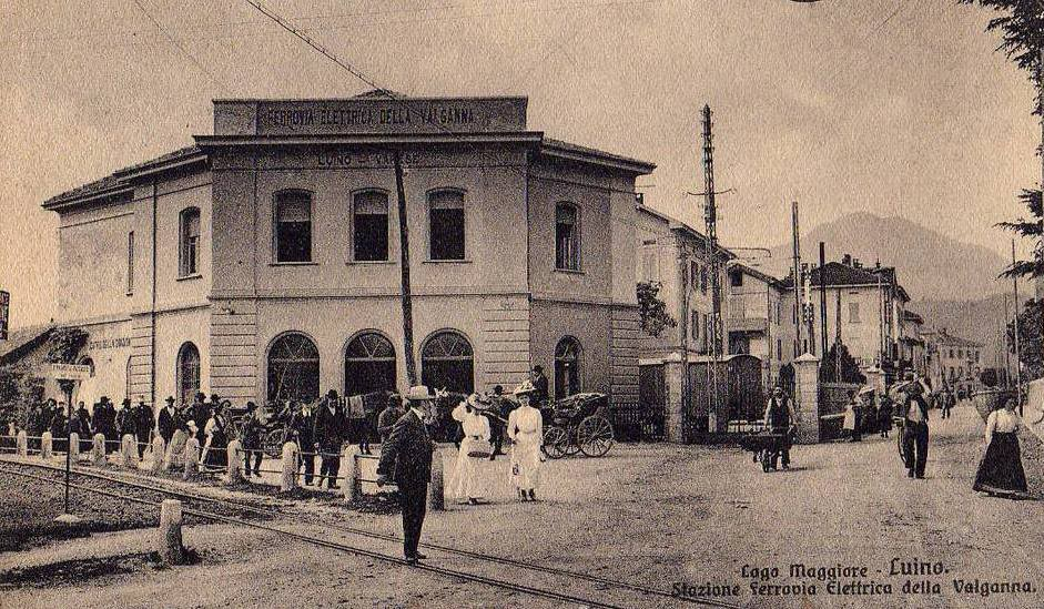 Il fabbricato viaggiatori della stazione di Luino della Società Varesina, capolinea della ferrovia della Valganna. Fu in esercizio dal 1905 al 1907, e da tale data venne adibita a scalo merci. In primo piano si nota il binario della ferrovia Ponte Tresa-Luino della SNF.